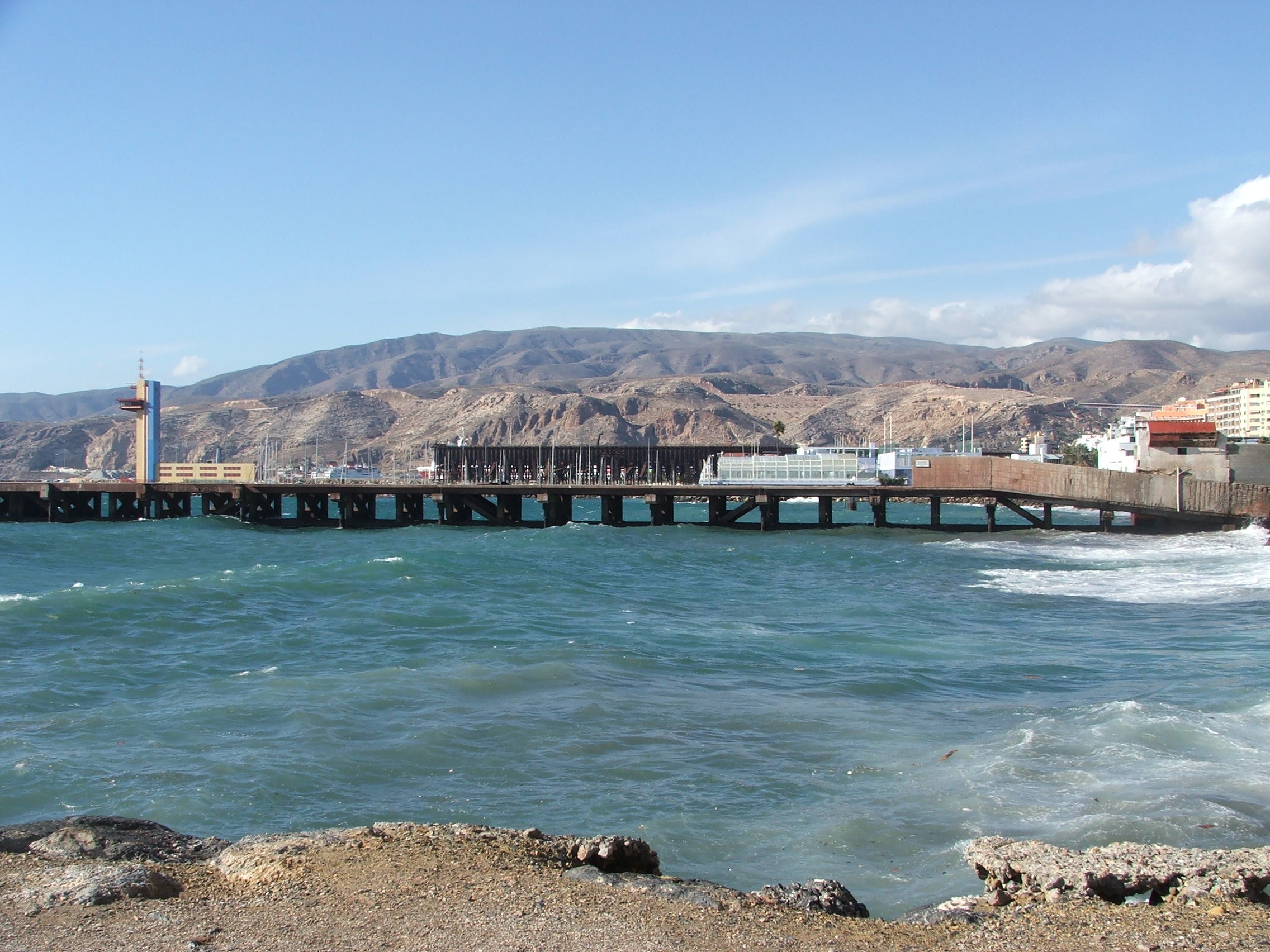 Fotografía del Cable Francés, en primer término, el Cable Inglés, detrás y más alto, y la torre del puerto de Almería, Andalucía, España. Vista desde el este hacia el oeste.